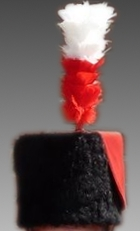 Colback d'un sapeur dans les marches de l'Entre-Sambre-Et-Meuse